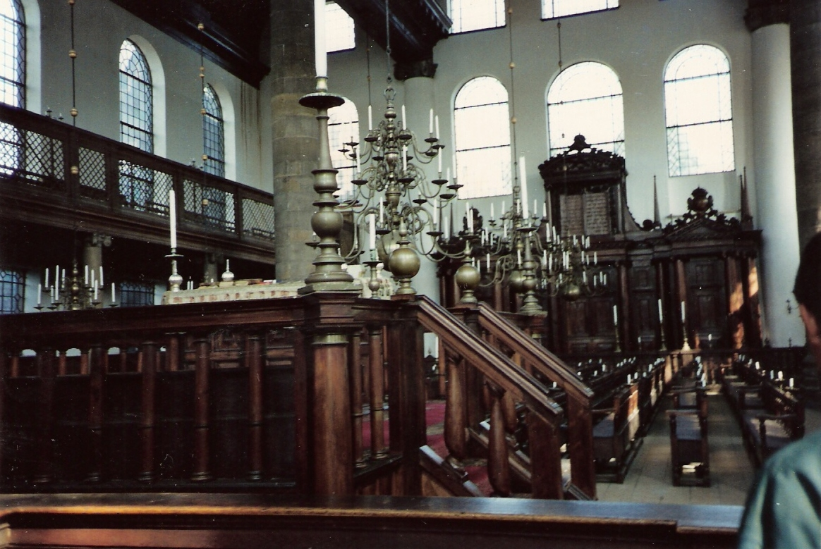 portuguese synagogue, amsterdam, holland